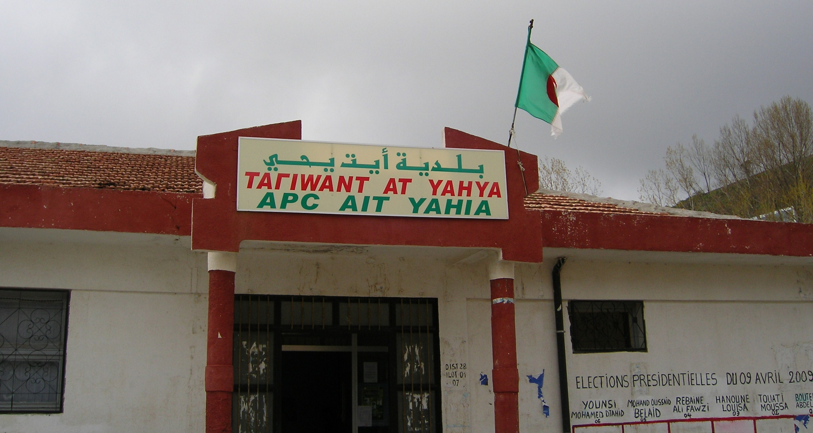 Fronton de la mairie d'Ait Yahia en Kabylie (Tizi Ouzou, Algérie).